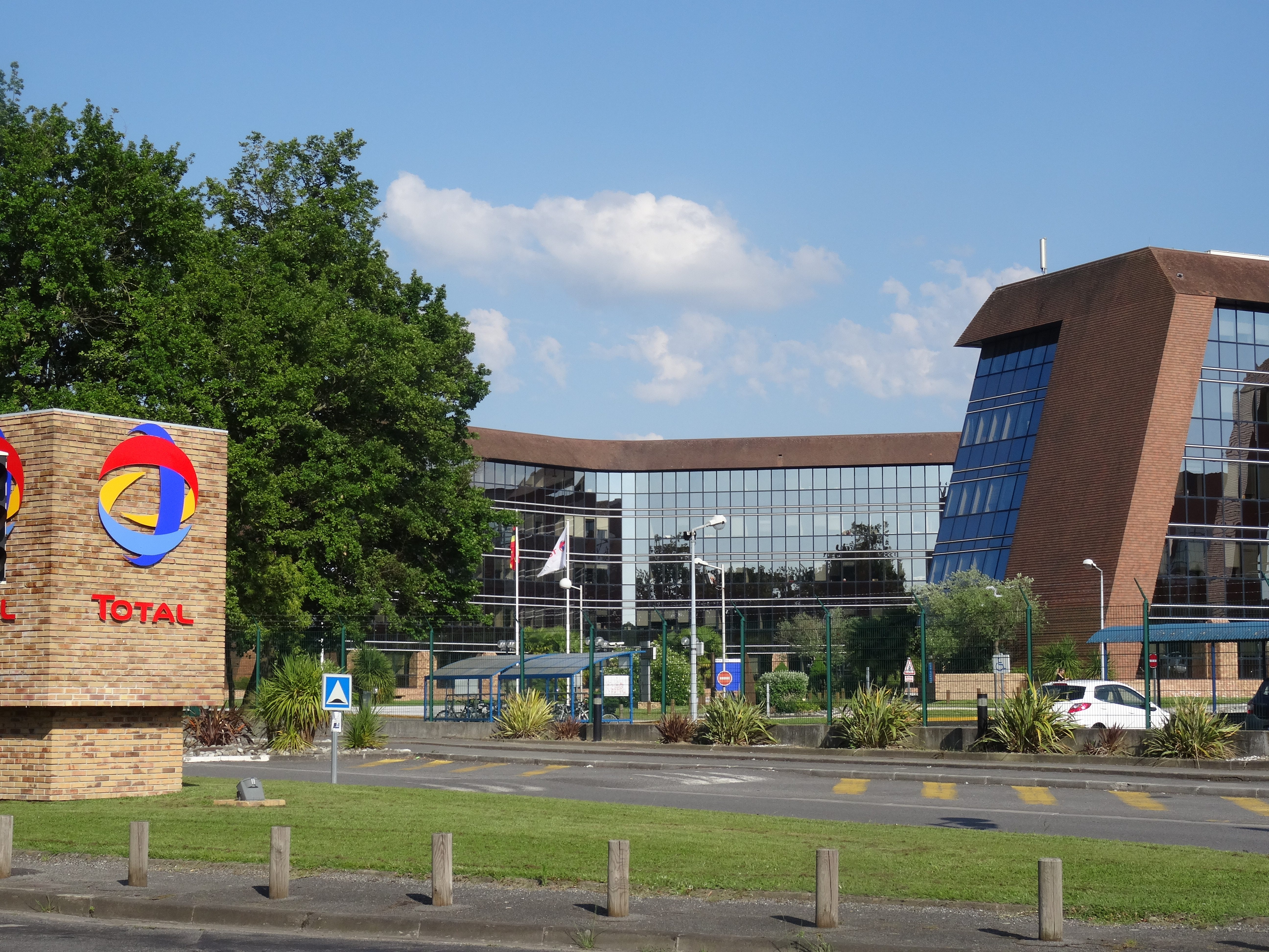 Centre Scientifique et Technique Jean-Féger à Pau